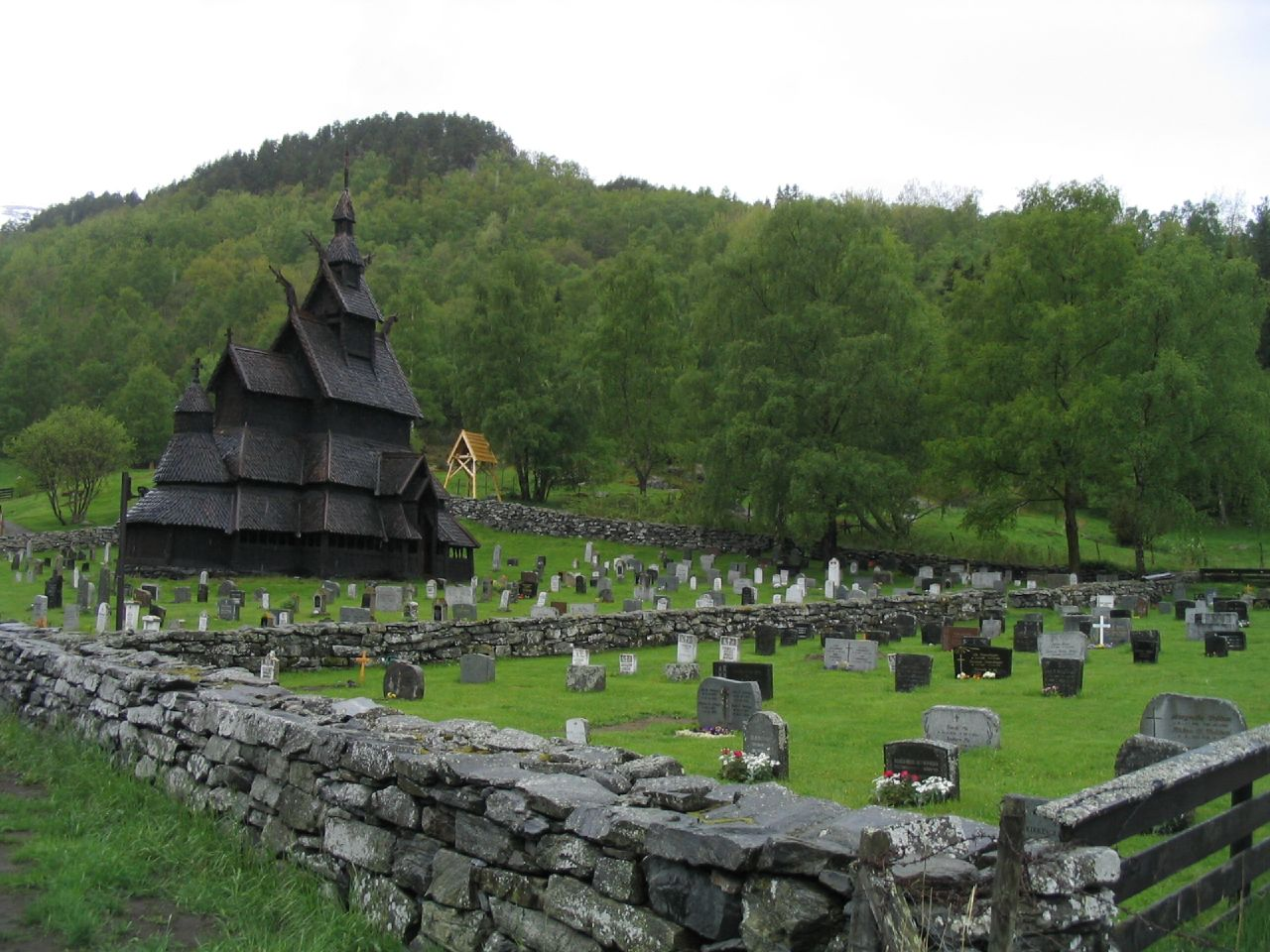 Borgund stavkyrkje en: Borgund stave church